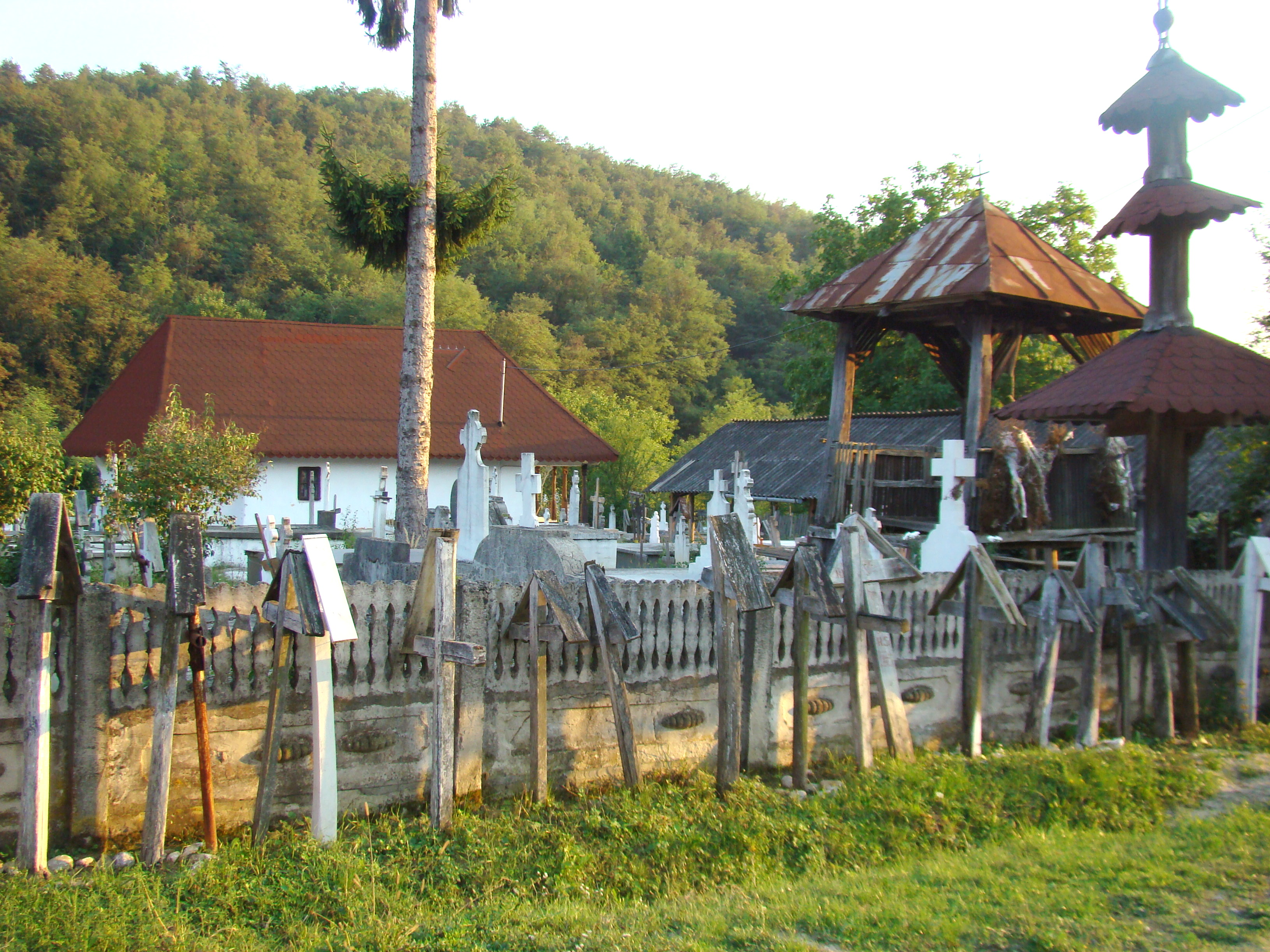 Biserica de lemn „Sf. Nicolae” din Ștefănești